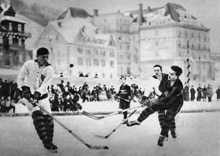 Mecz Pogoń Lwów - Legia Warszawa (4:0, hokejowe MP 1928 w Krynicy).